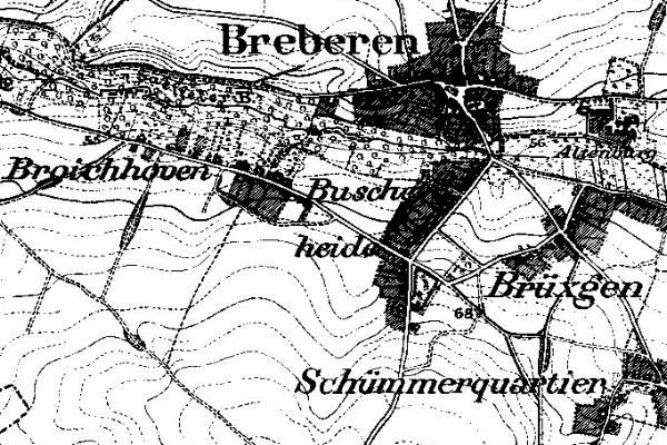 Neuaufnahme 1891-1912